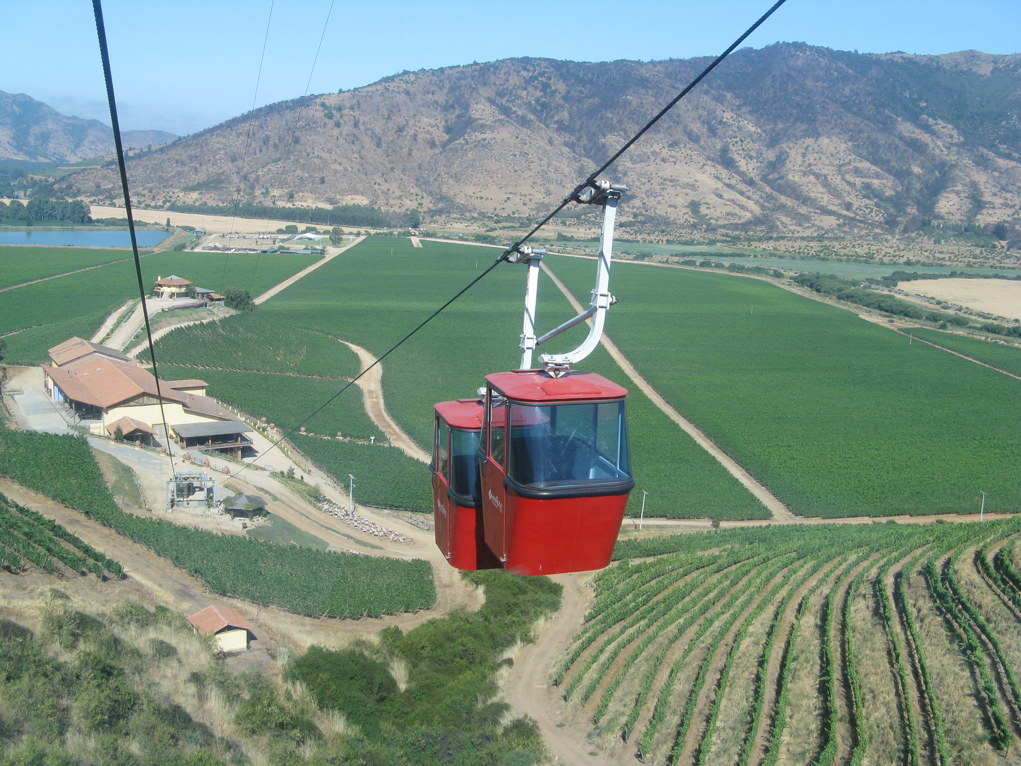 Viña Santa Cruz